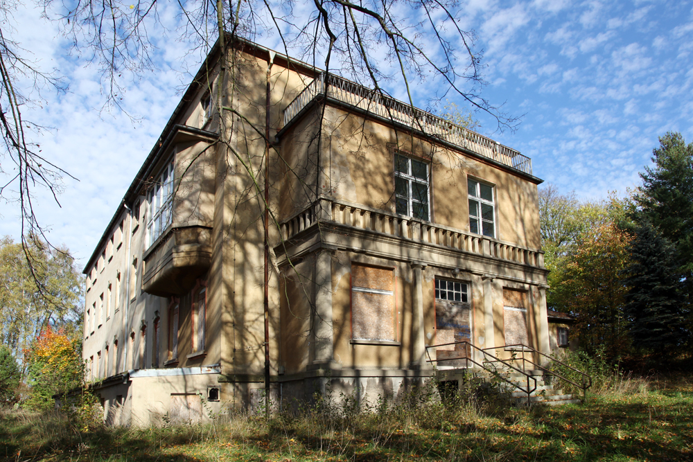 Carl-Großmann-Stift Großröhrsdorf, Klinikgebäude 2014